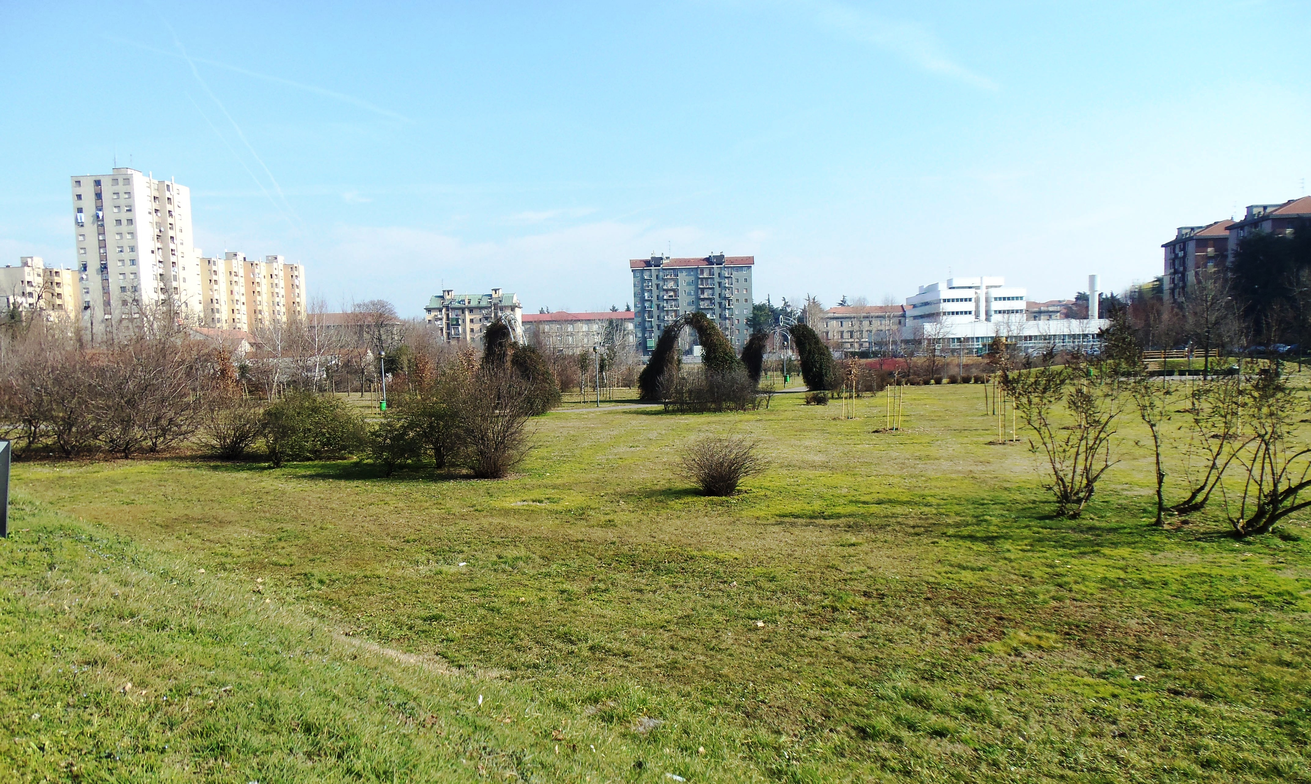 Milano, zona 7, parco Antonio Annarumma